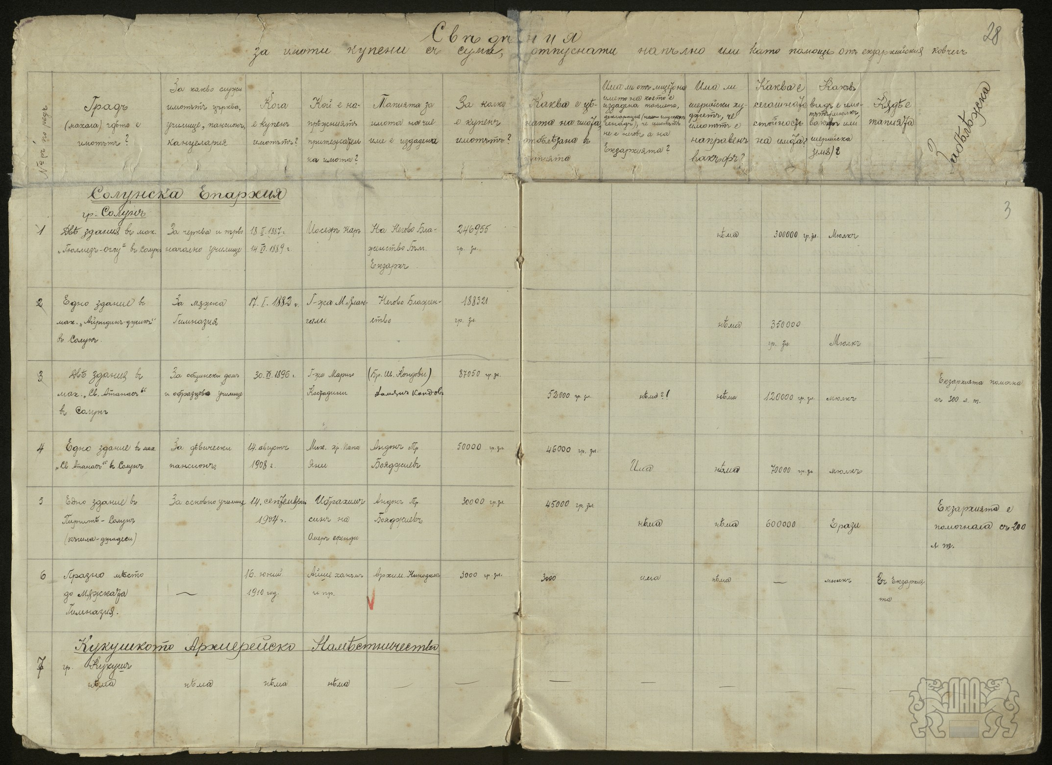 Недвижимите имоти в Солун, закупени изцяло или с помощи от Българската екзархия.